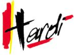 Le logo de la Hardi